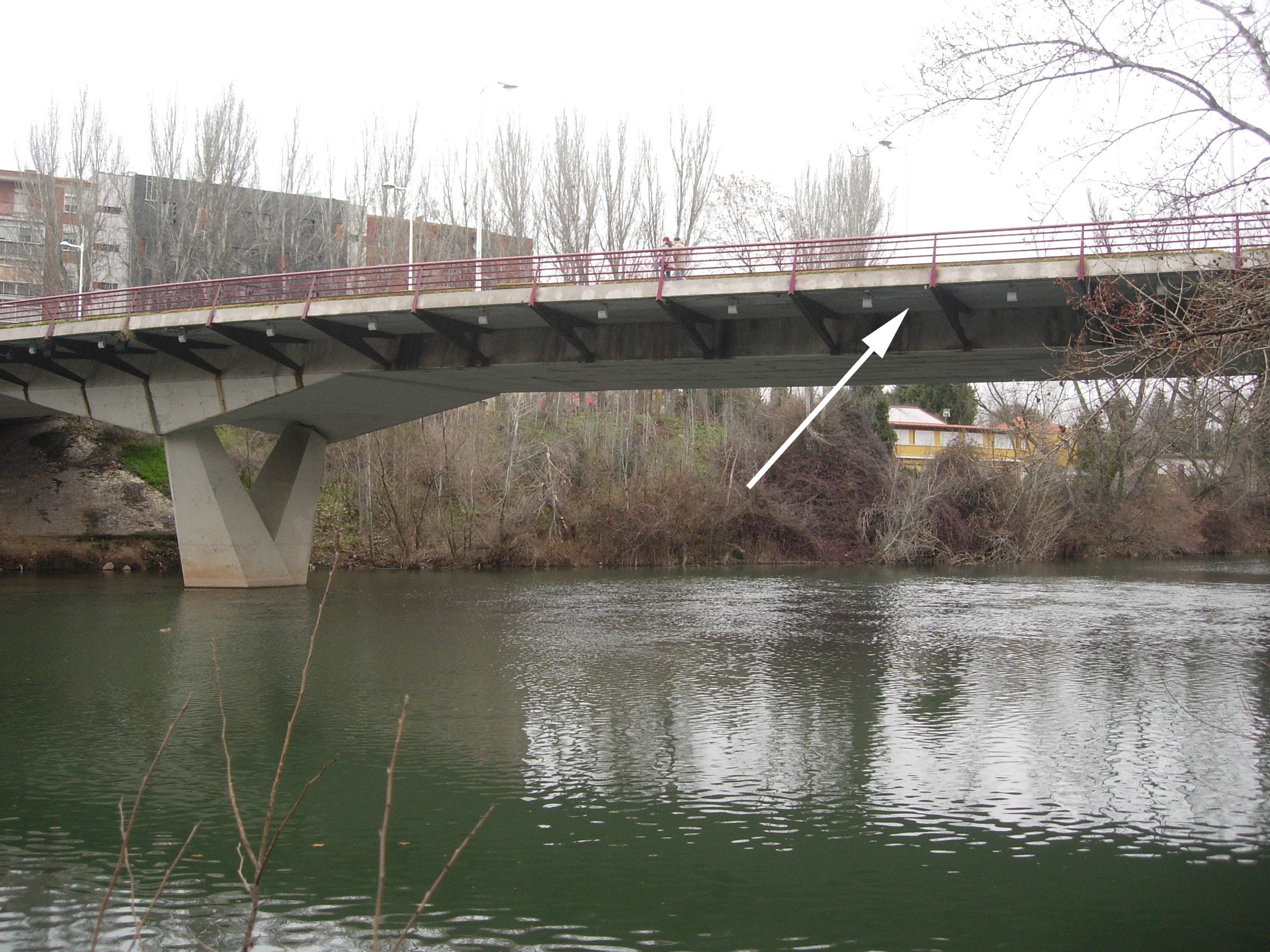 Situación de una cámara solarigráfica pegada bajo el puente de Condesa Eylo en Valladolid